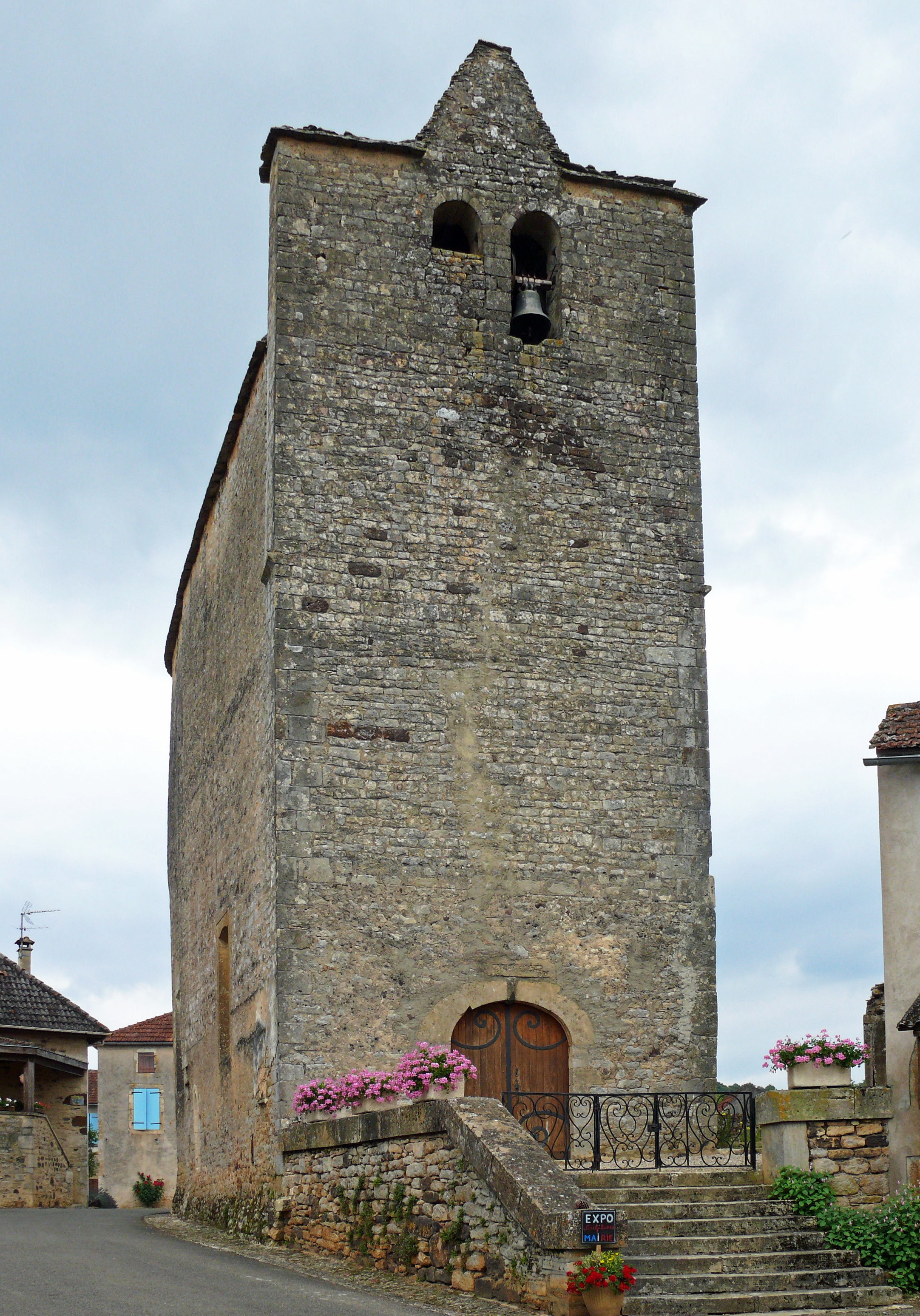 Saint-Caprais - Église Saint-Caprais - Façade .